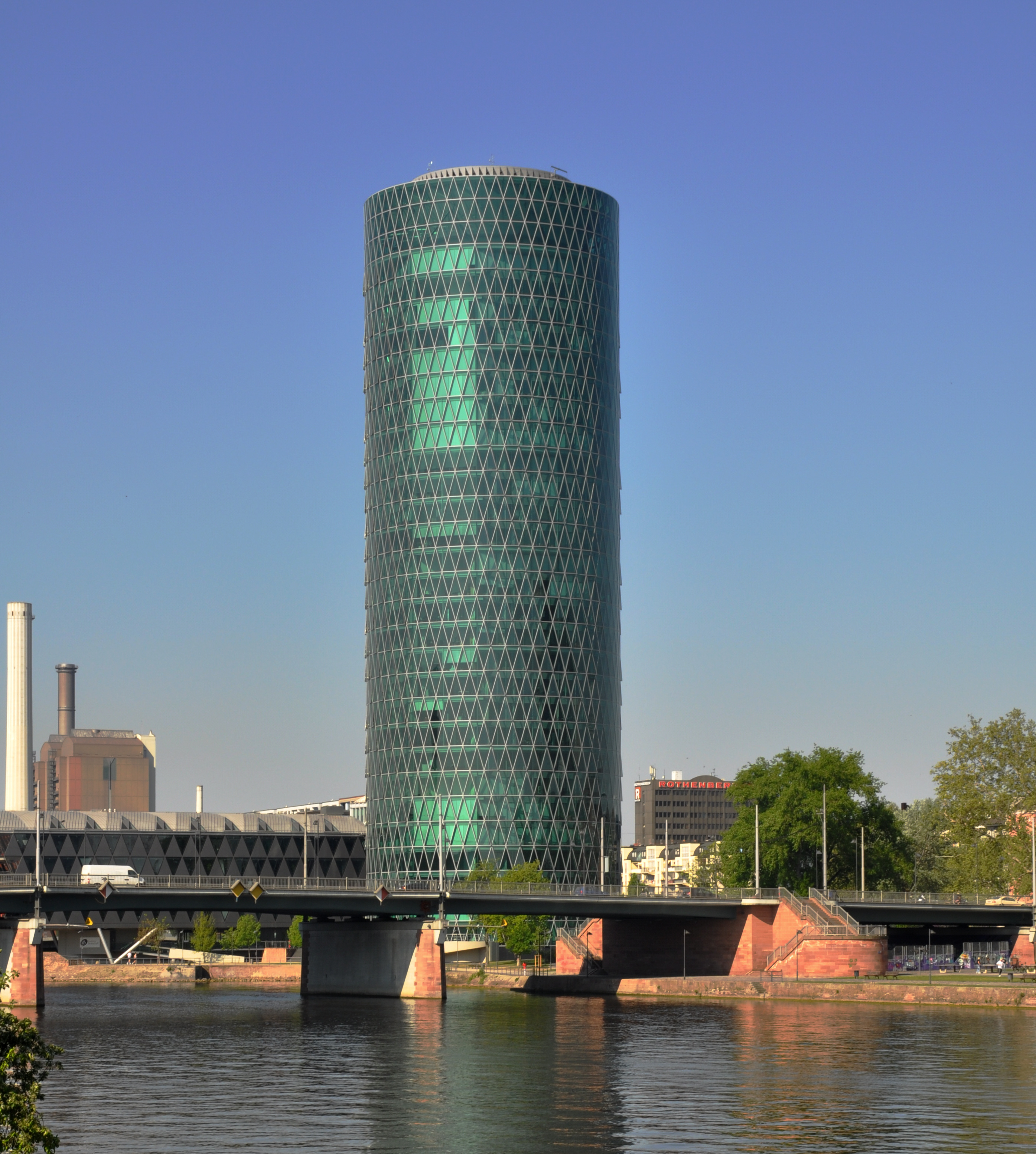 Frankfurt am Main, Blick vom Schaumainkai zum Westhafen Tower